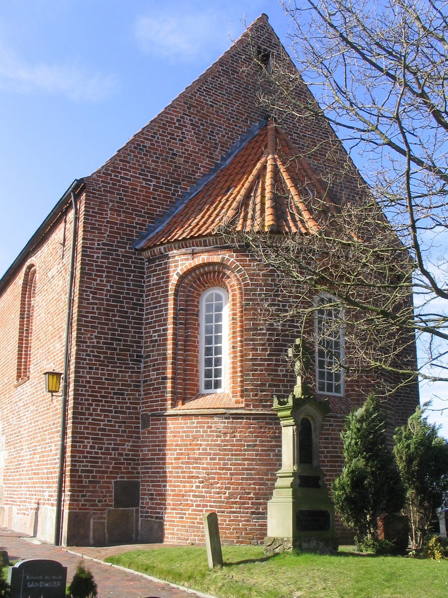 Ev.-luth. Kirche Wiefels